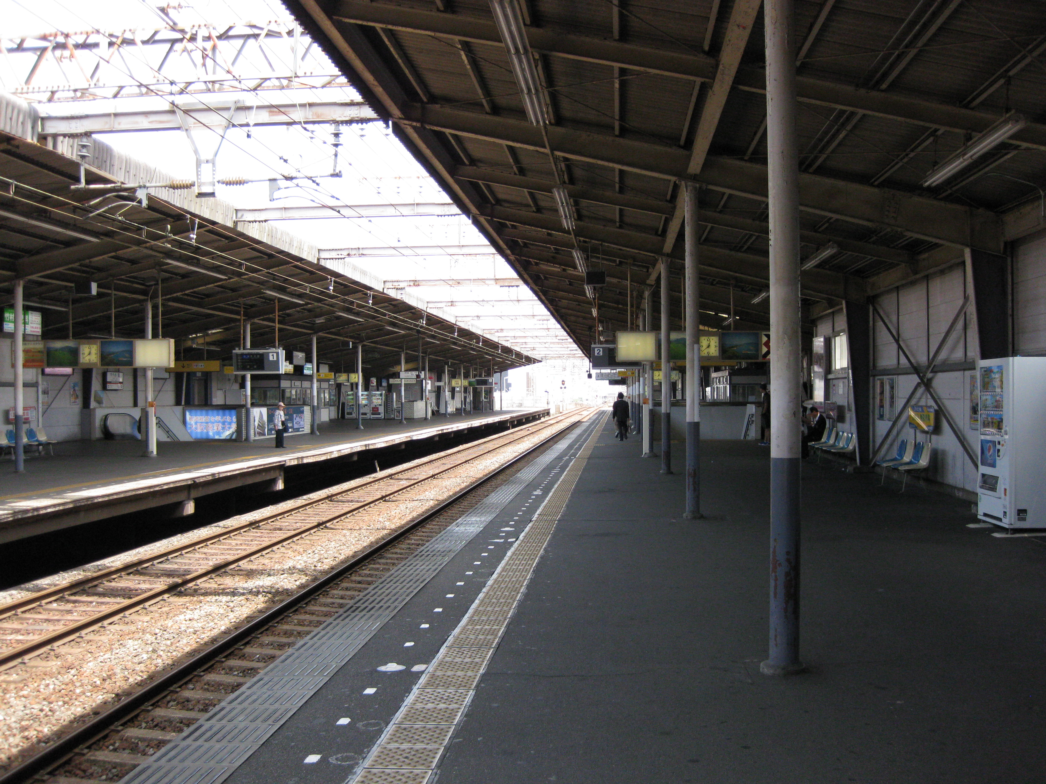 河内小阪駅プラットホーム